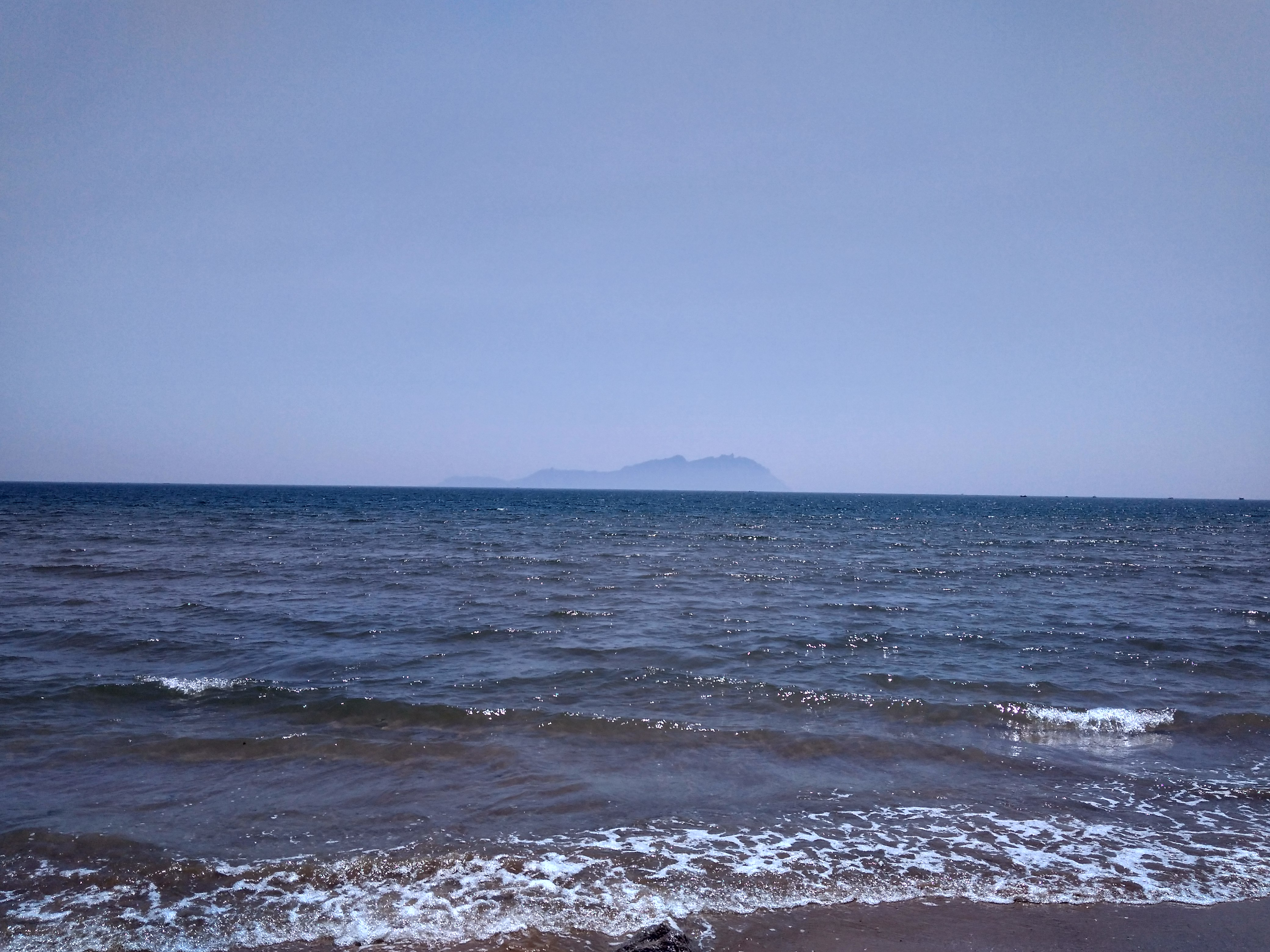 中文（中国大陆）: 从海军公园远眺灵山岛